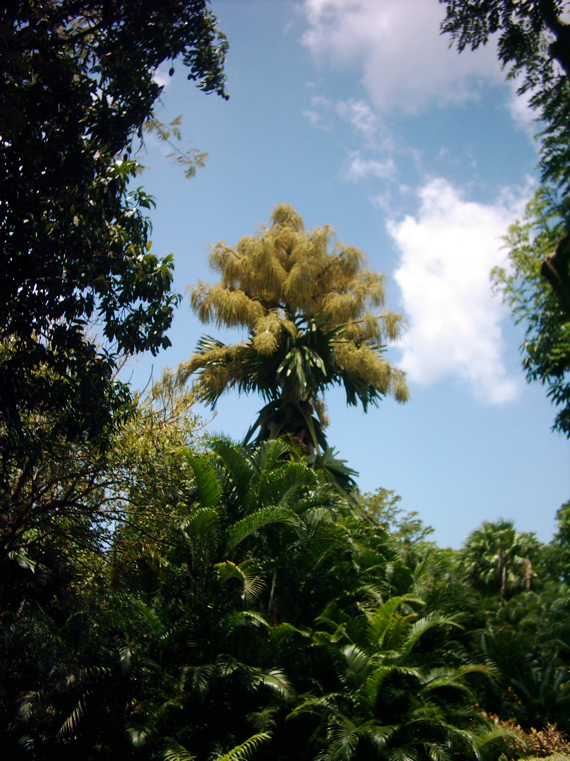 Un palmier talipot, dans le parc de Deshaies en Guadeloupe. Il fleurit une seule fois dans sa vie avant de mourir.